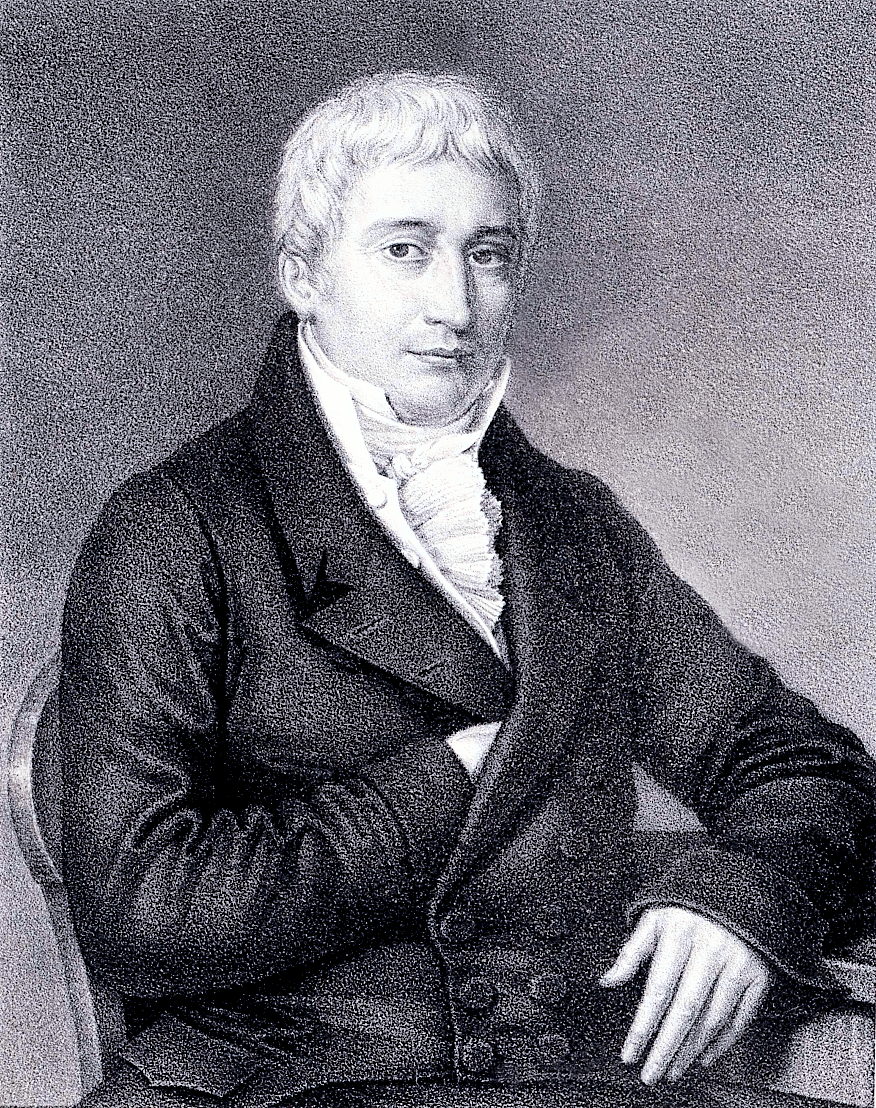 Georg Simon Freiherr von Sina zu Hodos und Kisdia